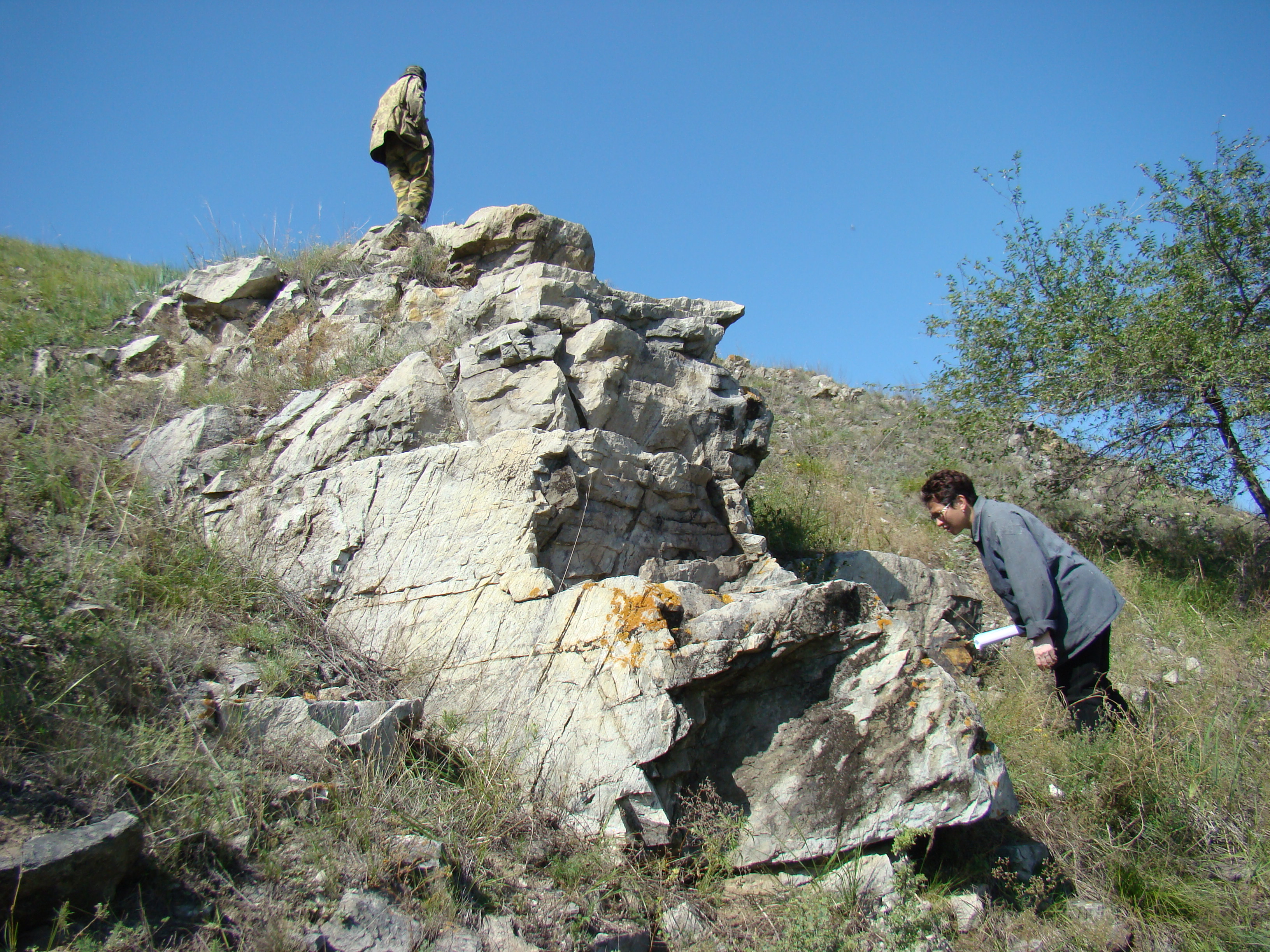 Руководитель Зарубинской библиотеки Татьяна Зарубина в археологической экспедиции на горе Бага-Заря